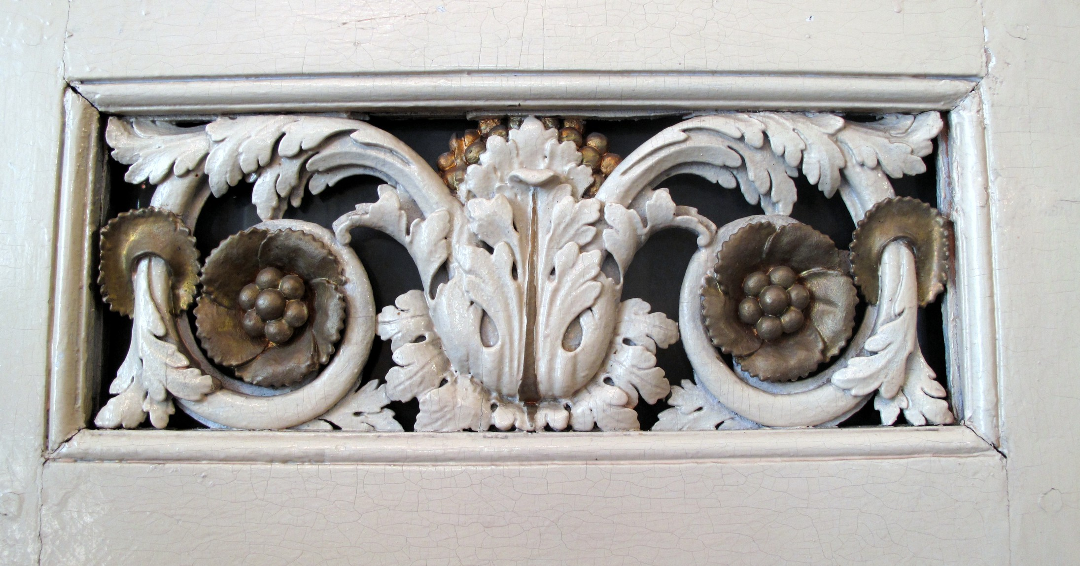 Шафа у Відділі стародруків та рідкісних видань. Фрагмент